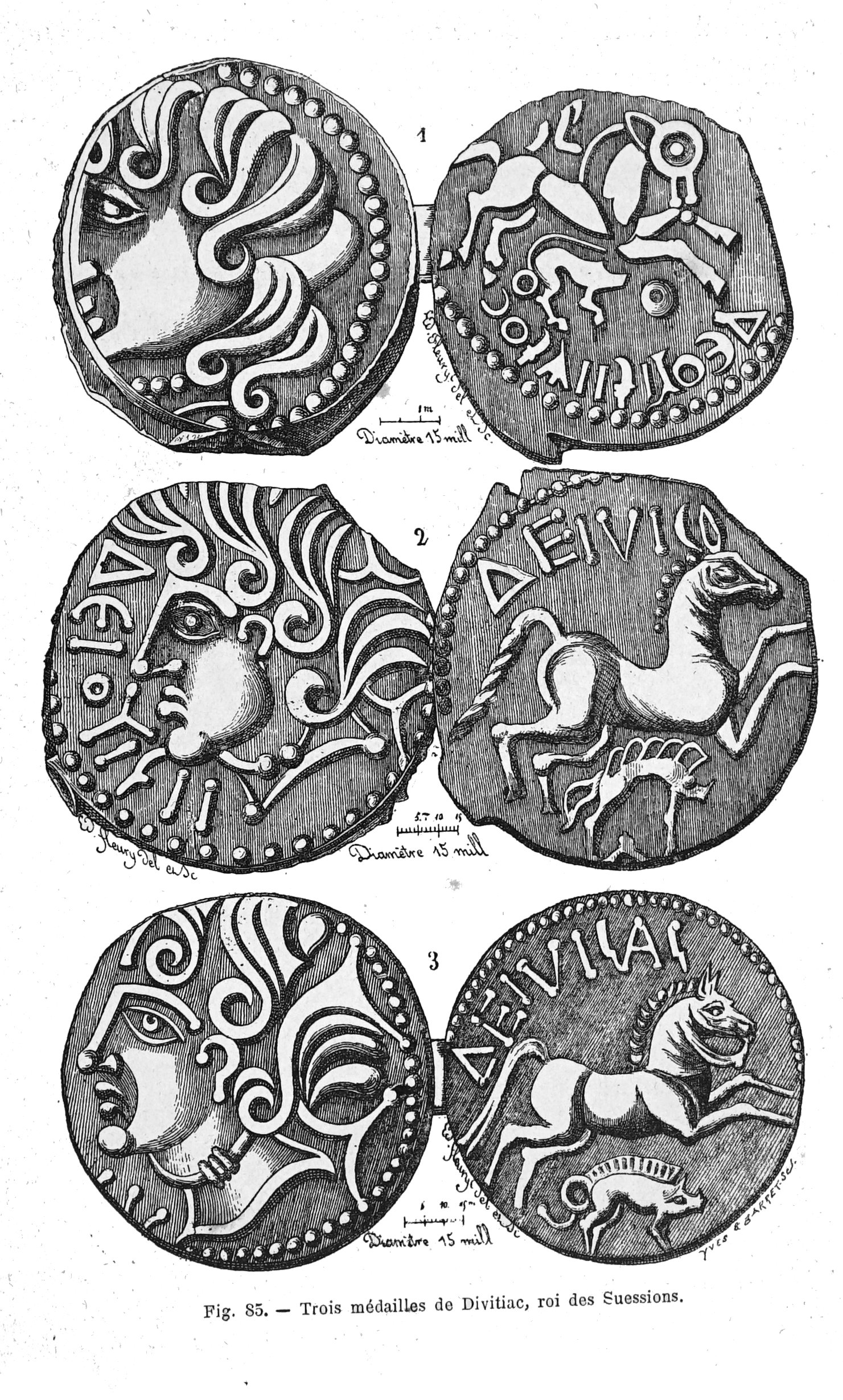 dessin par Fleury.